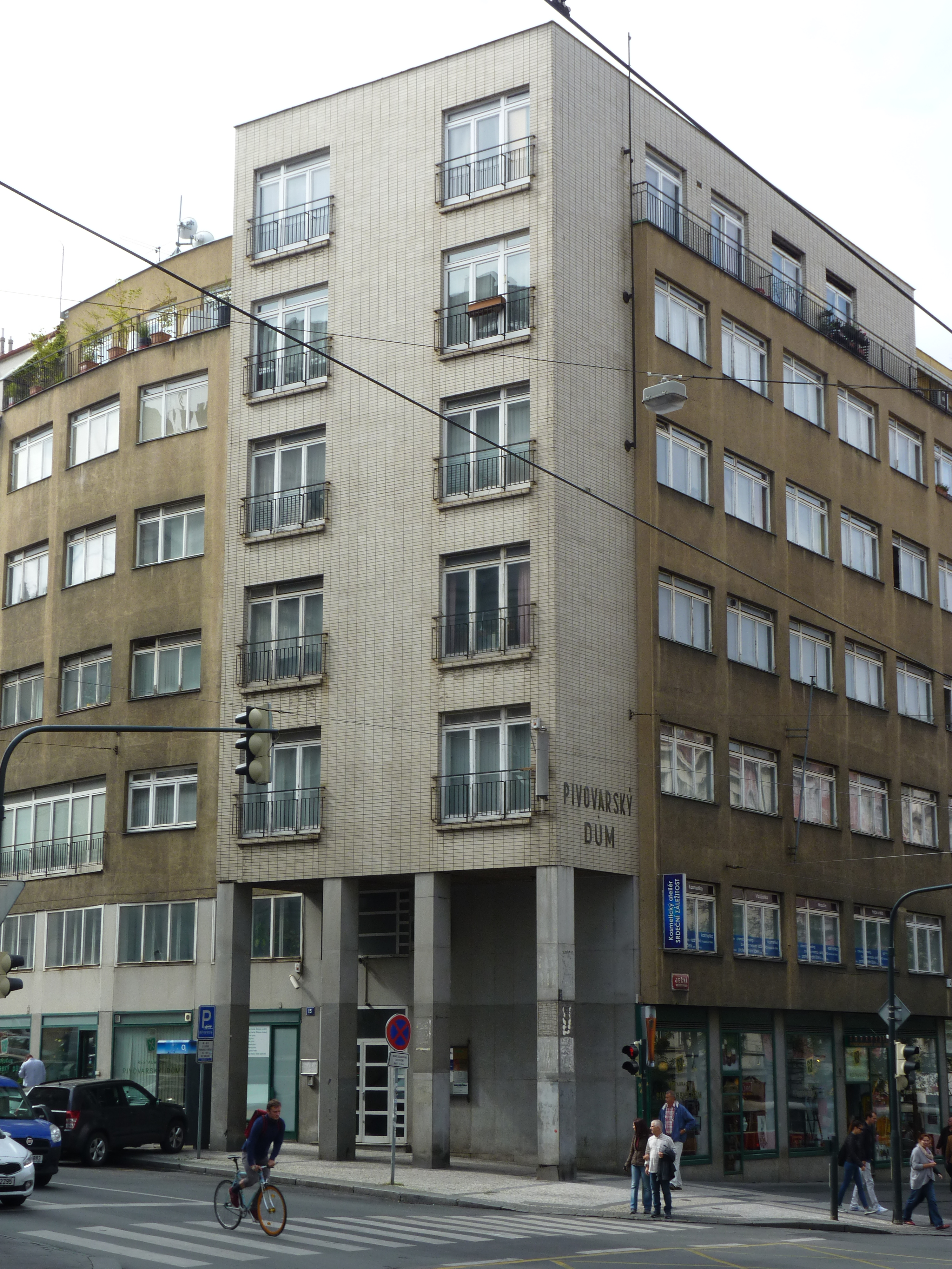 Výzkumný ústav pivovarský a sladařský v Praze, hlavní budova